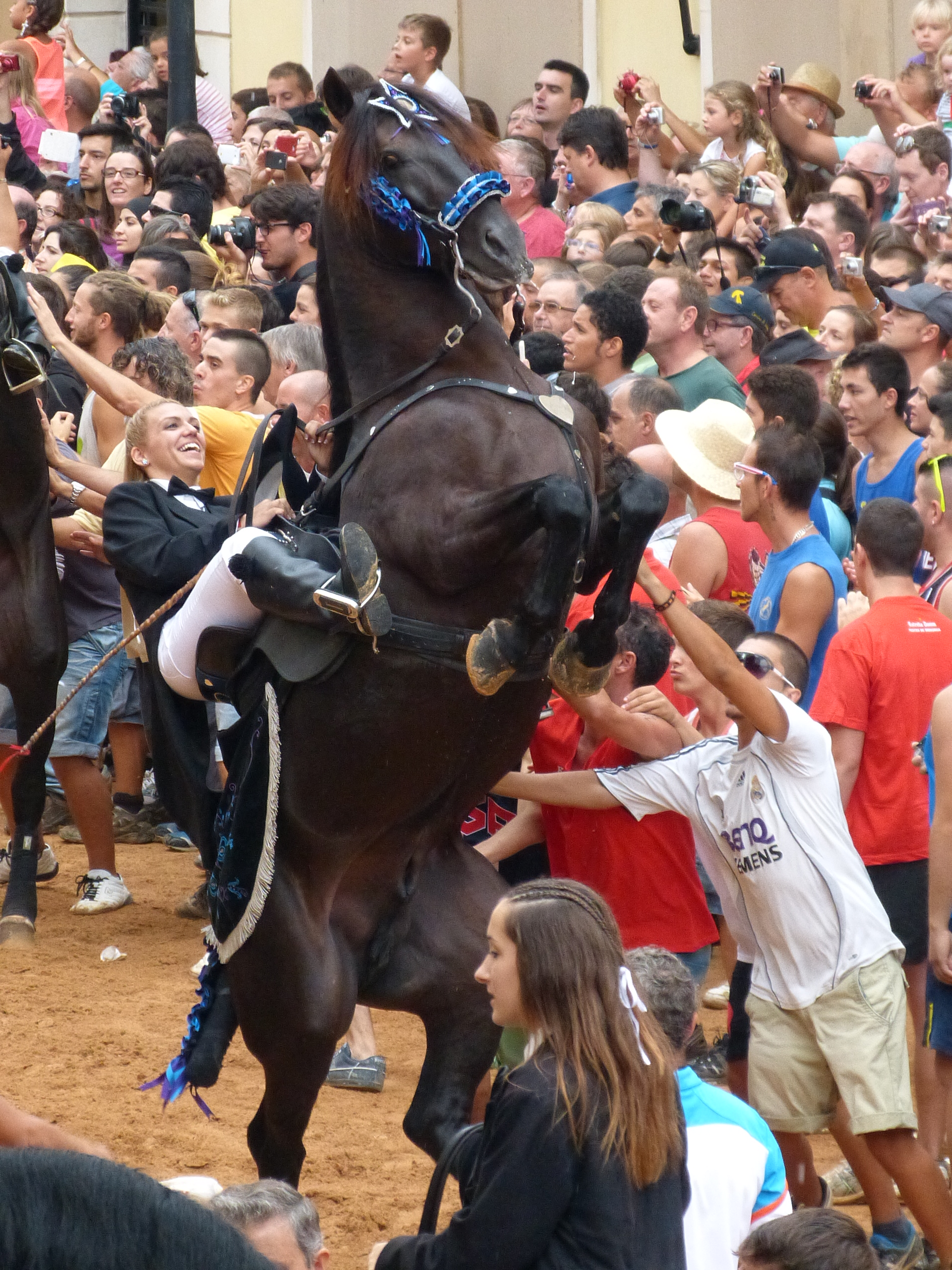 Fiestas de la Virgen de Gracia en Mahon Menorca. Jaleo de caballos en la plaza del Ayuntamiento. This is a photography of a Folklore festival in Spain (Wikidata id Q13258770).